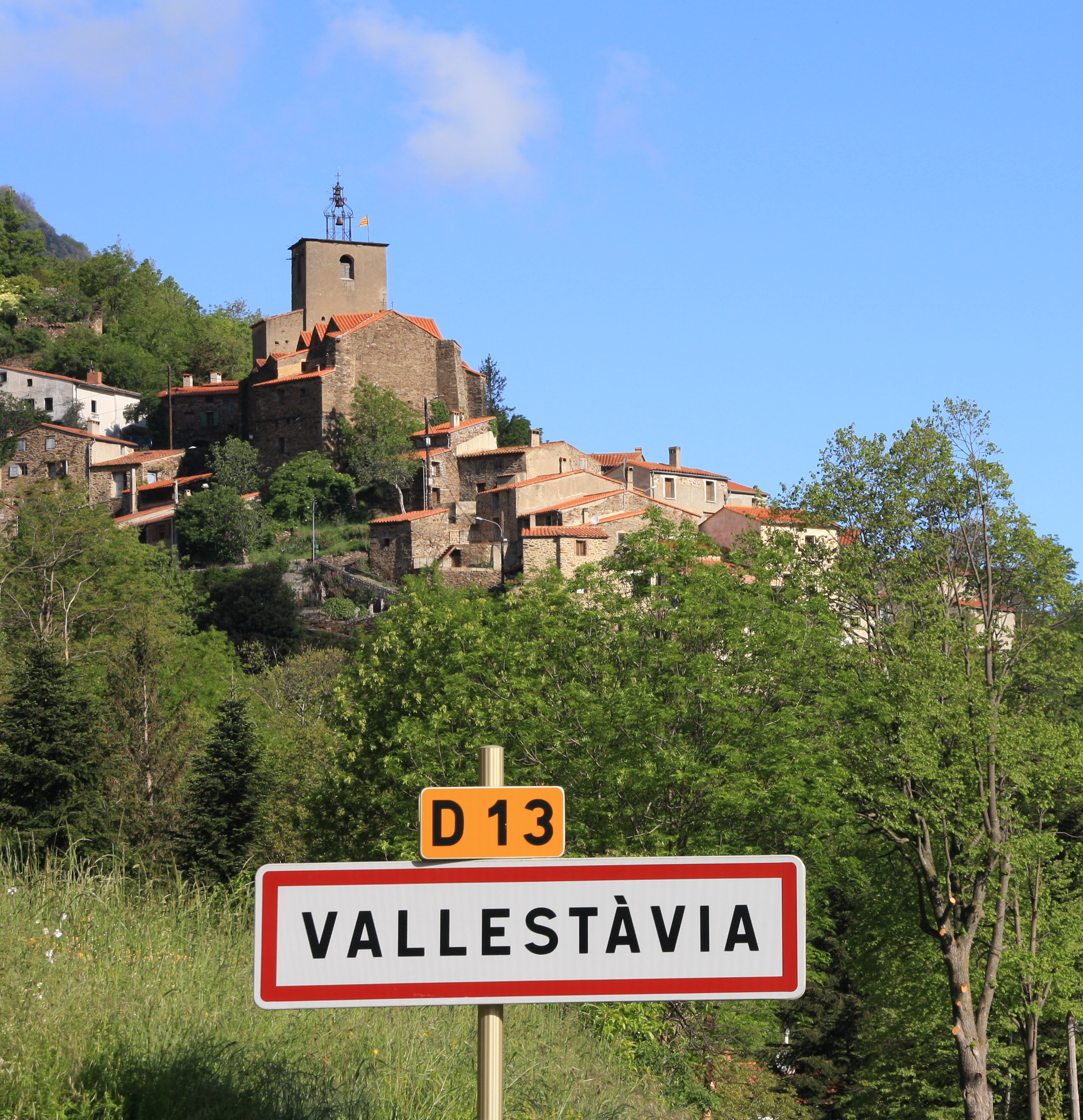 Village du Conflent avec Gimp 2.08